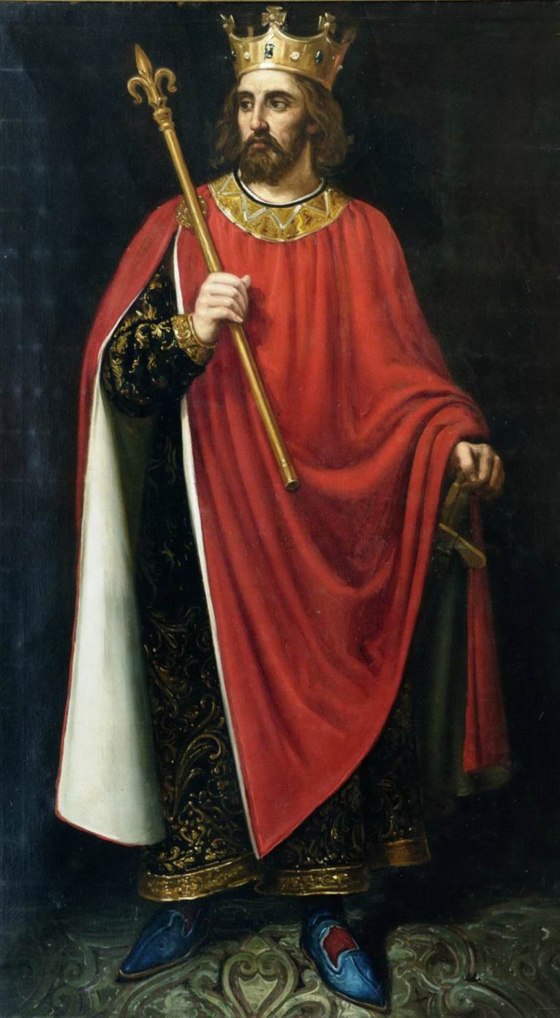 Retrato imaginario del rey Alfonso IV de León († 933). Fue hijo del rey Ordoño II de León y de la reina Elvira Menéndez. Fue coronado en el año 926 y renunció al trono tras la muerte de su esposa, la reina Oneca de Pamplona. Tras su abdicación ingresó como religioso en el monasterio de Sahagún, pero intentó recuperar el trono leonés y su hermano, Ramiro II de León, que ya reinaba en su lugar, le capturó y ordenó que fuera cegado. Falleció en el año 933 en el desaparecido monasterio de San Julián y Santa Basilisa de Ruiforco.